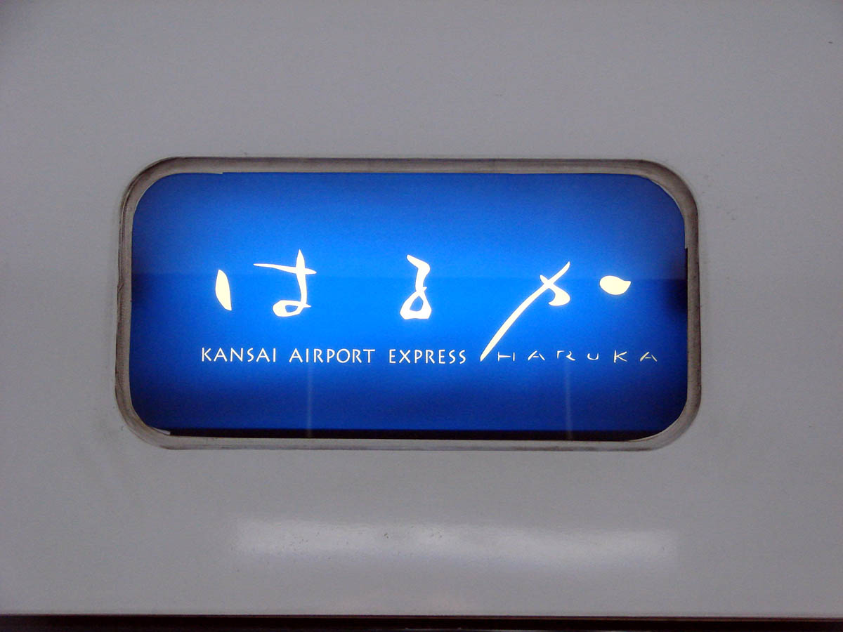 特急はるか ロゴマーク